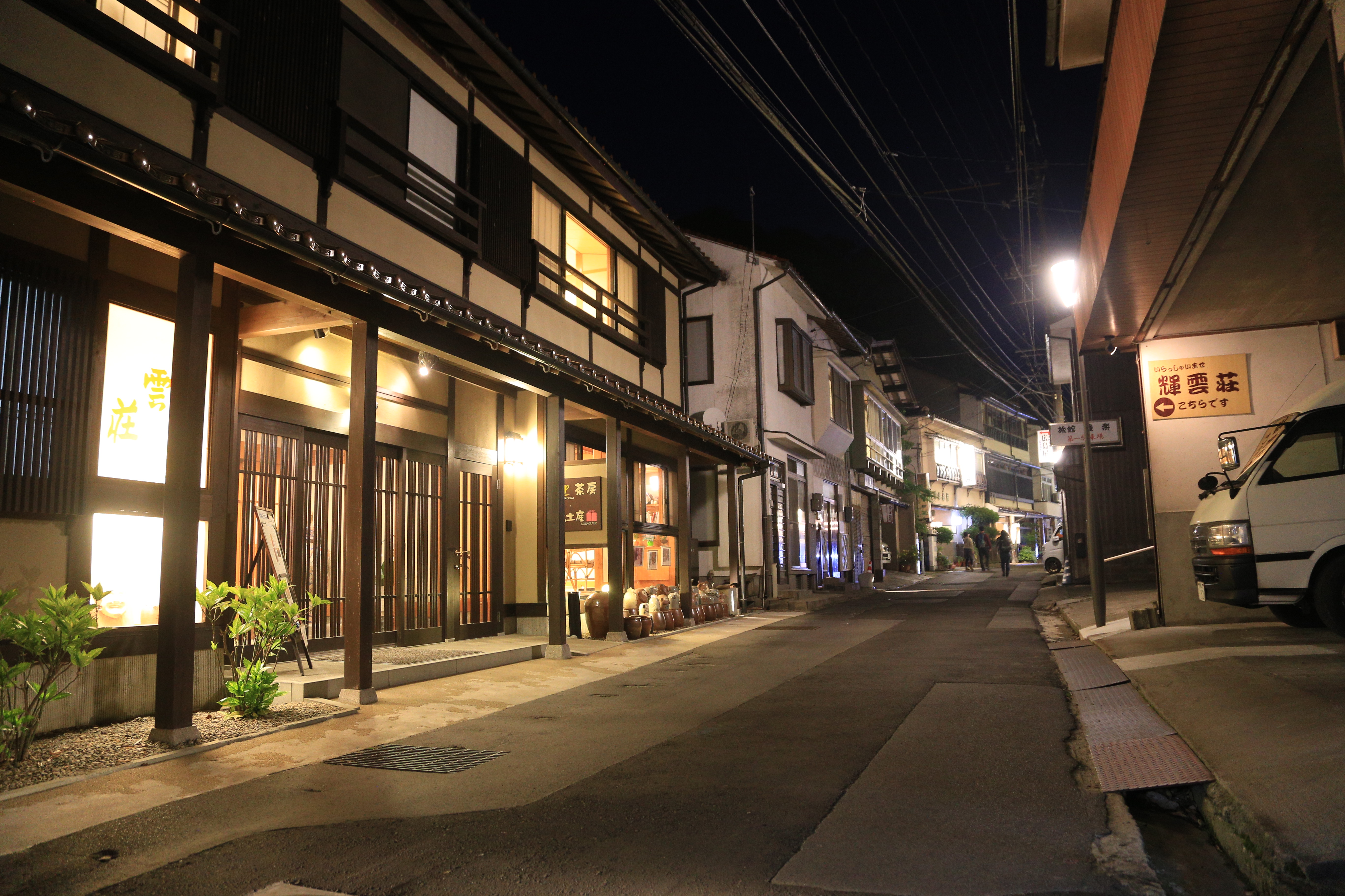 島根県江津市にある温泉津温泉の街並み